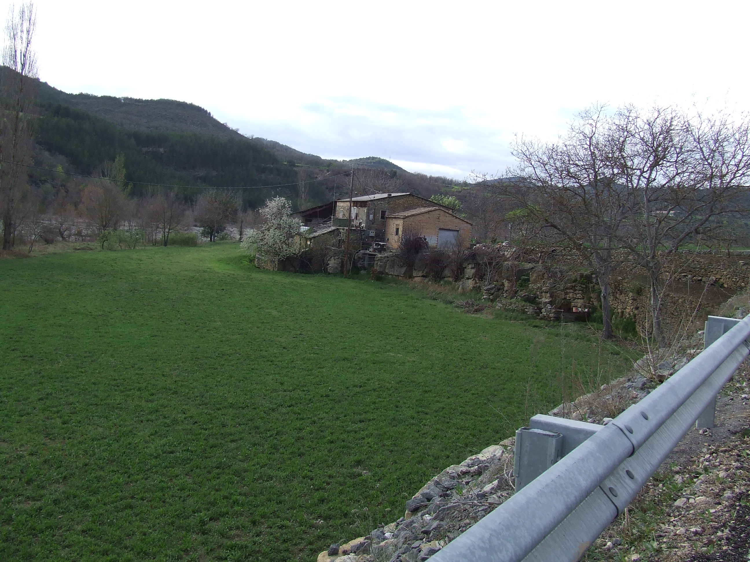 La masia de l'Agustina (Sant Esteve de la Sarga, Pallars Jussà)